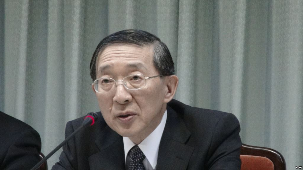 中華民國外交部部長林永樂就廣大興28號事件向菲律賓表示抗議。